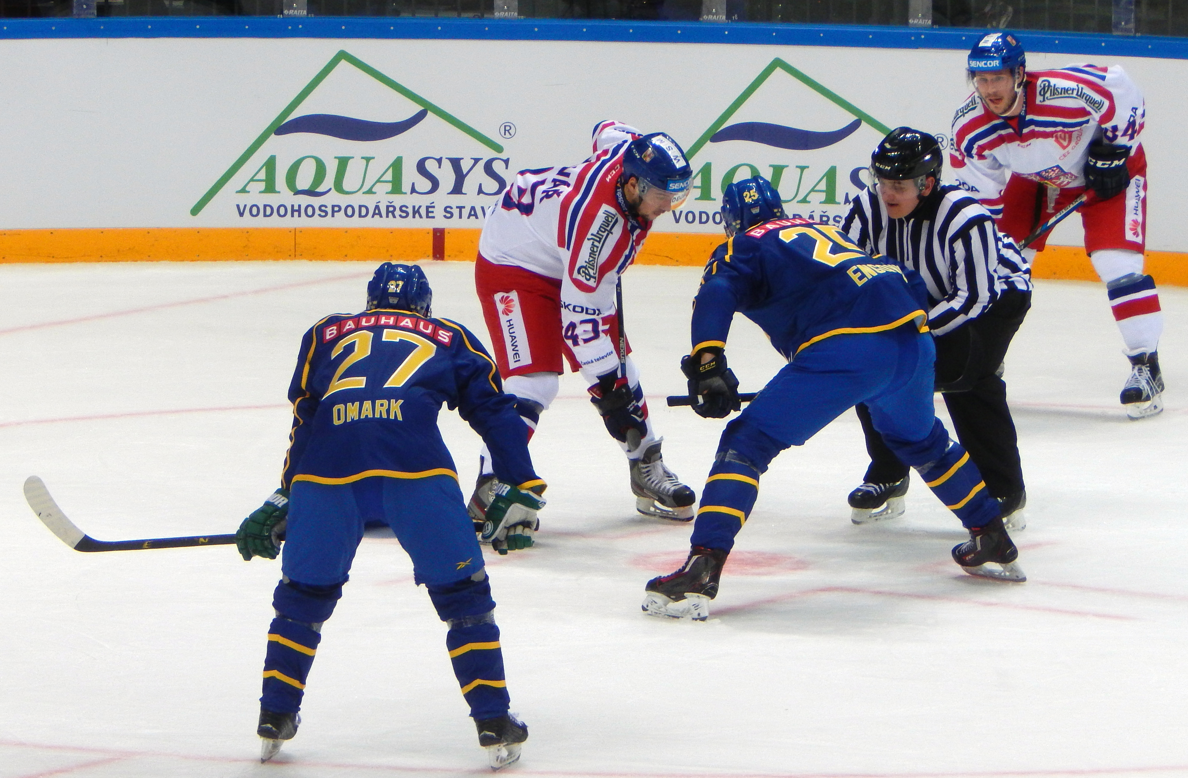 Вбрасывание на матче Кубка Первого Канала 2015 между Чехией и Швецией